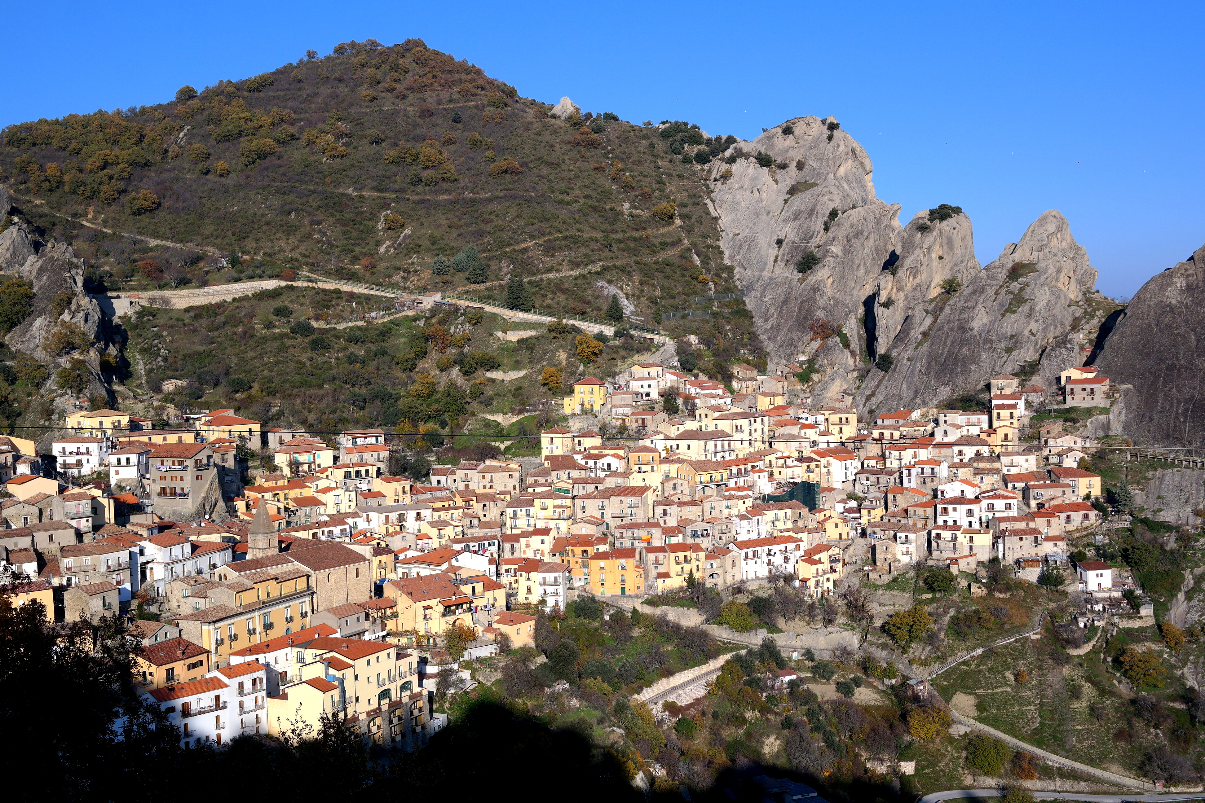 Veduta di Castelmezzano (Potenza)